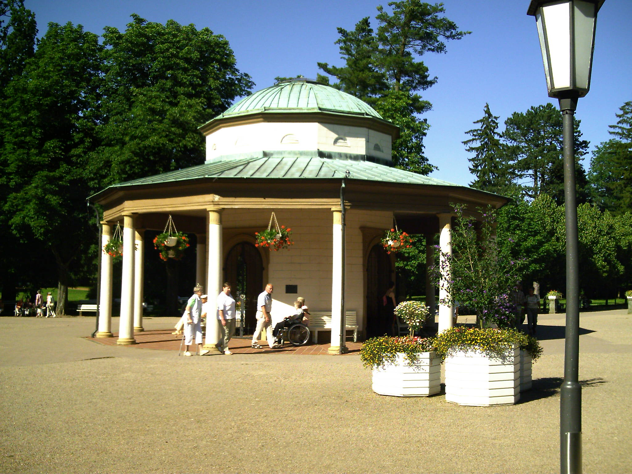 Brunnentempel, historischer Kurpark, Bad Meinberg, Horn-Bad Meinberg